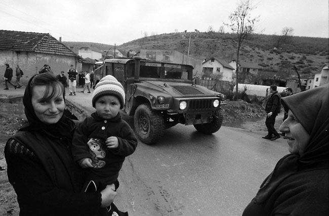 Косово и Метохија: Живот у војску КФОР-а, која неалбанце штити од терориста.Фотографије из пројекта "Корени душе". Фото:Дарко Дозет